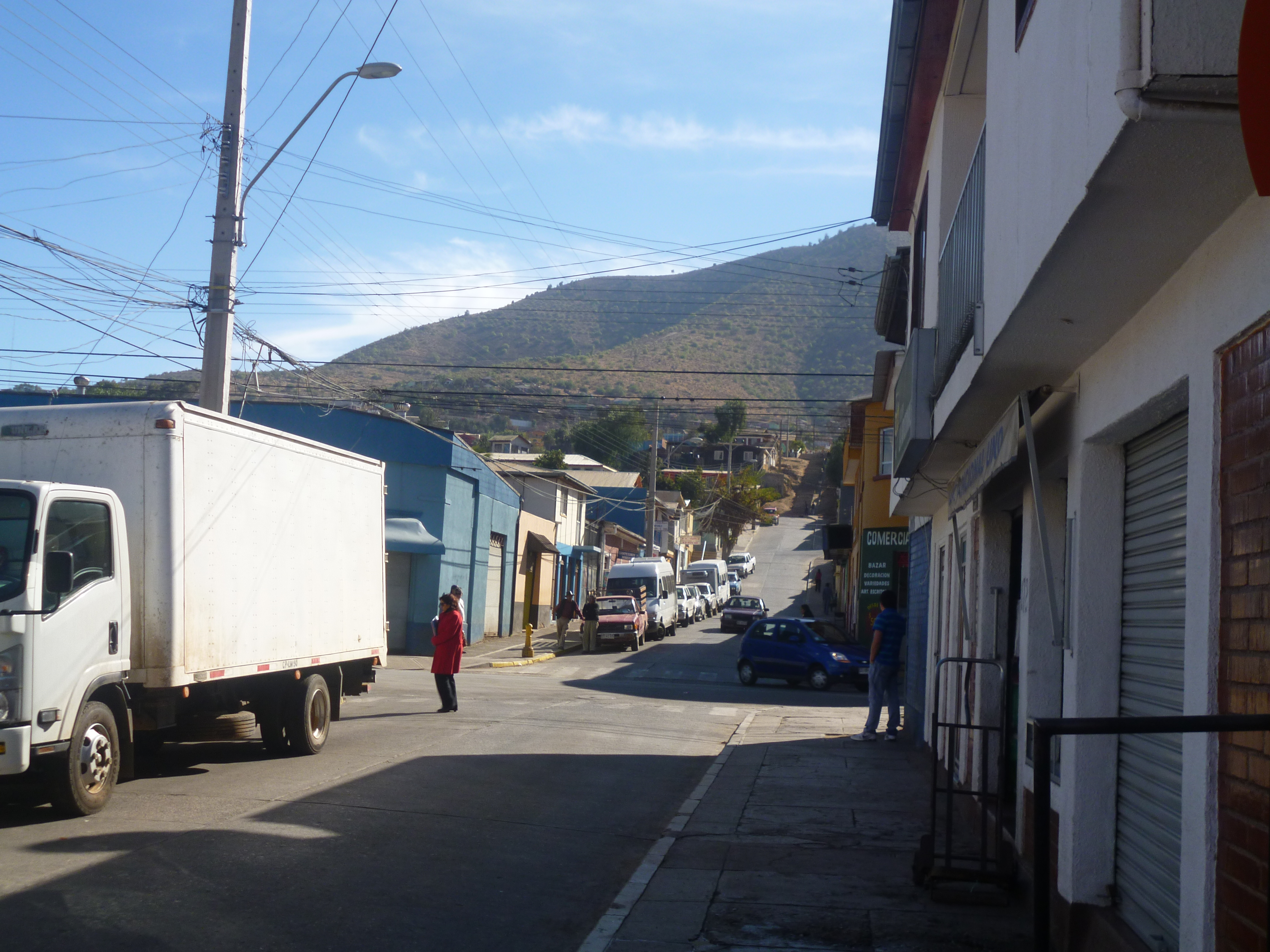 Barrio Carrera